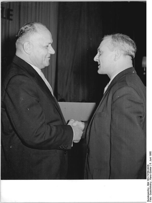 Zentralbild Quaschinski 7.6.1960 2. Arbeiterfestspiele des FDGB. Auszeichnung mit dem Kunst- und Literaturpreis 1960. Auf einem Empfang des Bundesvorstandes des FDGB wurde am 6.6.1960 die Verleihung des Kunst- und Literaturpreises des FDGB vom Stellvertreter des Vorsitzenden des FDGB, Walter Buchheim, vorgenommen. UBz: Walter Buchheim (rechts) überreicht Karl-Erich Koch den Kunstpreis des FDGB 1960 für seine "Illustration zum Brigadetagebuch"